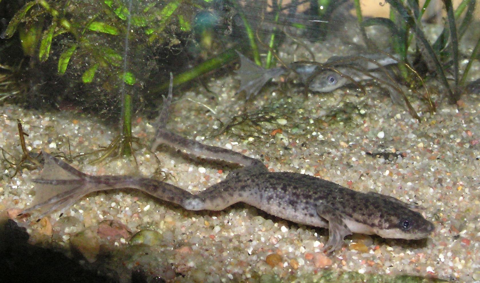 Karlik szponiasty (Hymenochirus boettgeri)